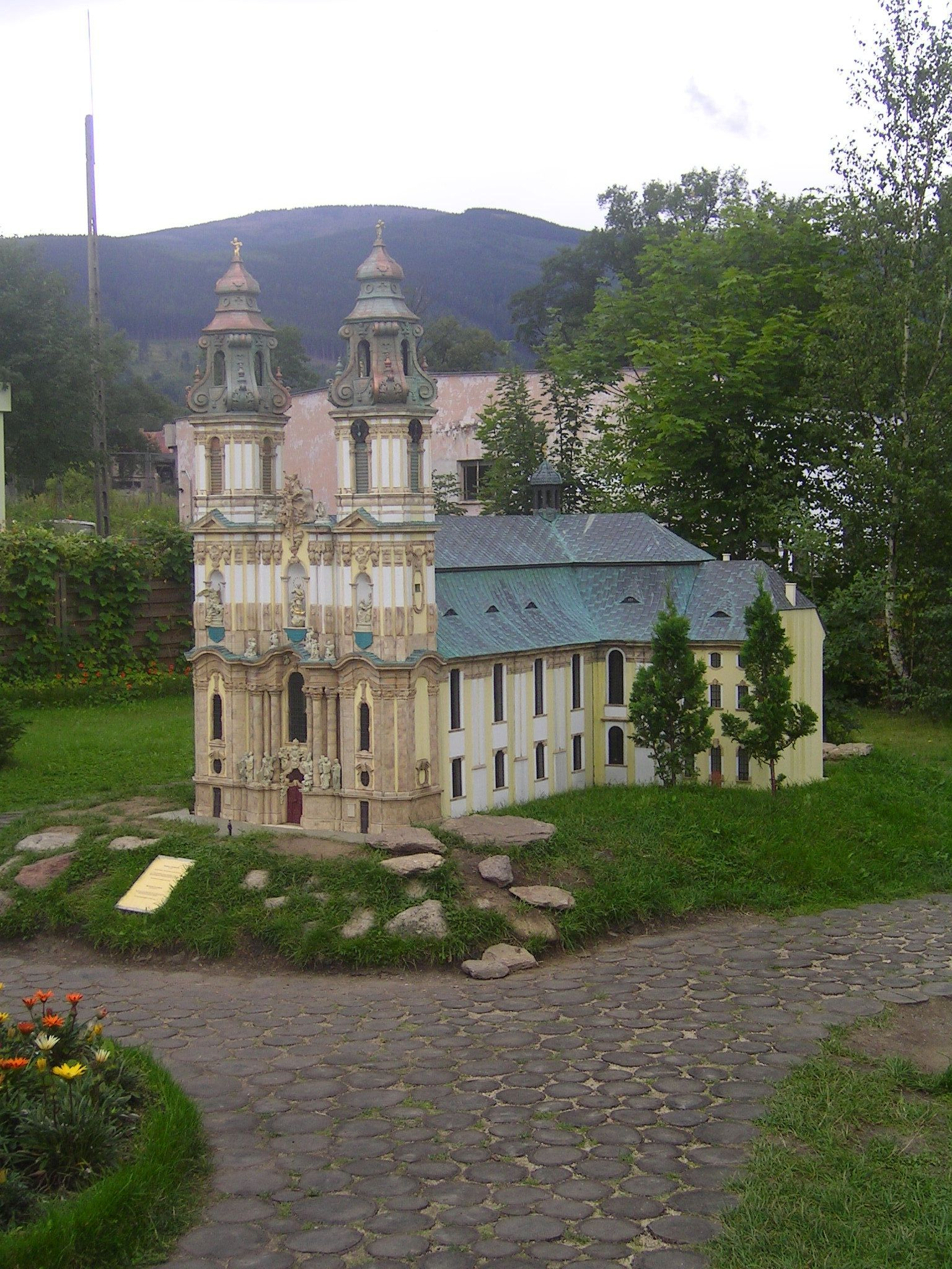 Park Miniatur Zabytków Dolnego Śląska autor: Radwa Bazylika w Krzeszowie